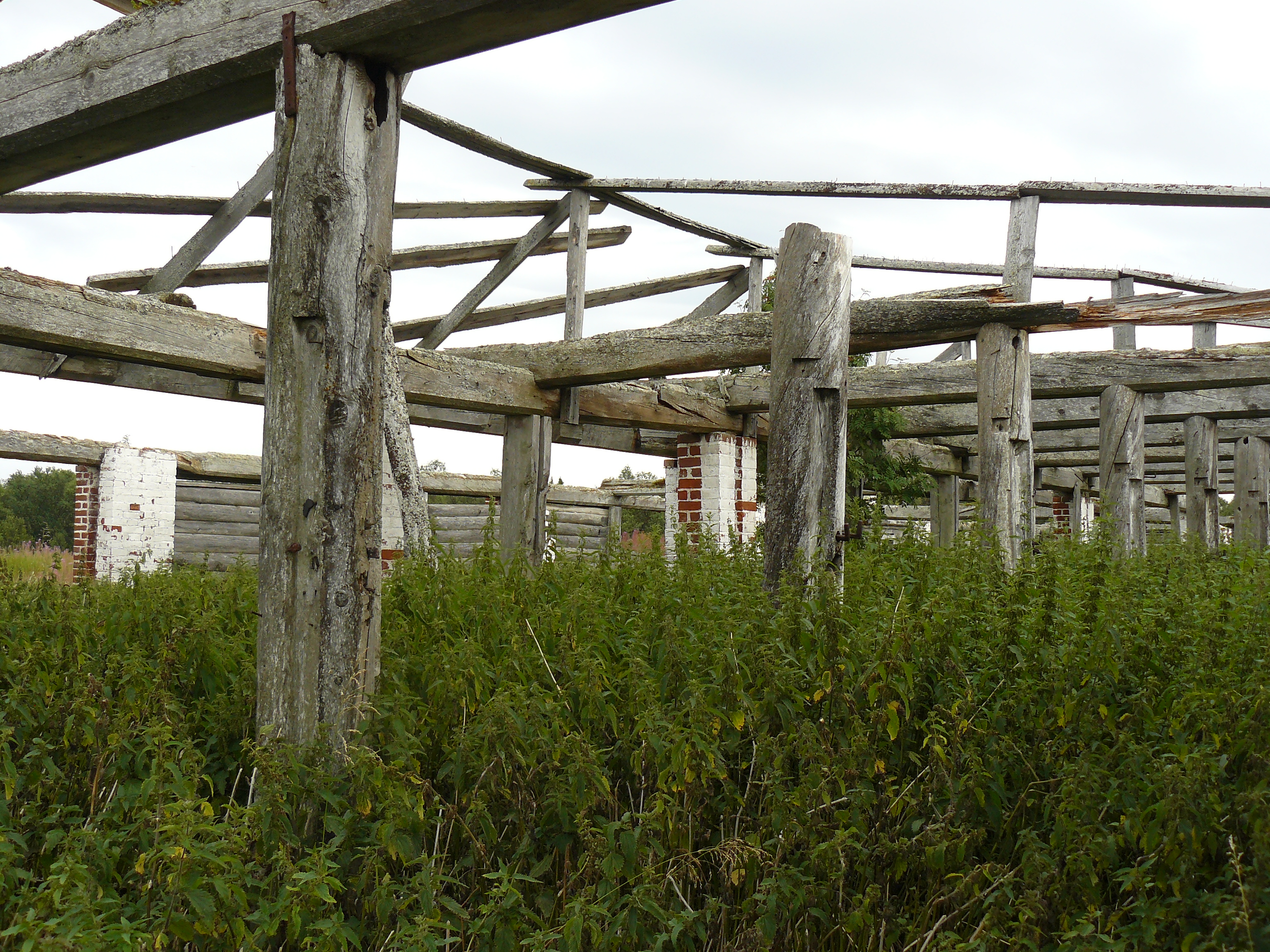 Рештки табору на острові Велика Мускалма